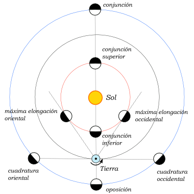 AUTOR: Francisco Javier Blanco González España -Kingdom of Spain- Aspectos de los planetas superiores e inferiores del Sistema Solar. Junio de 2006